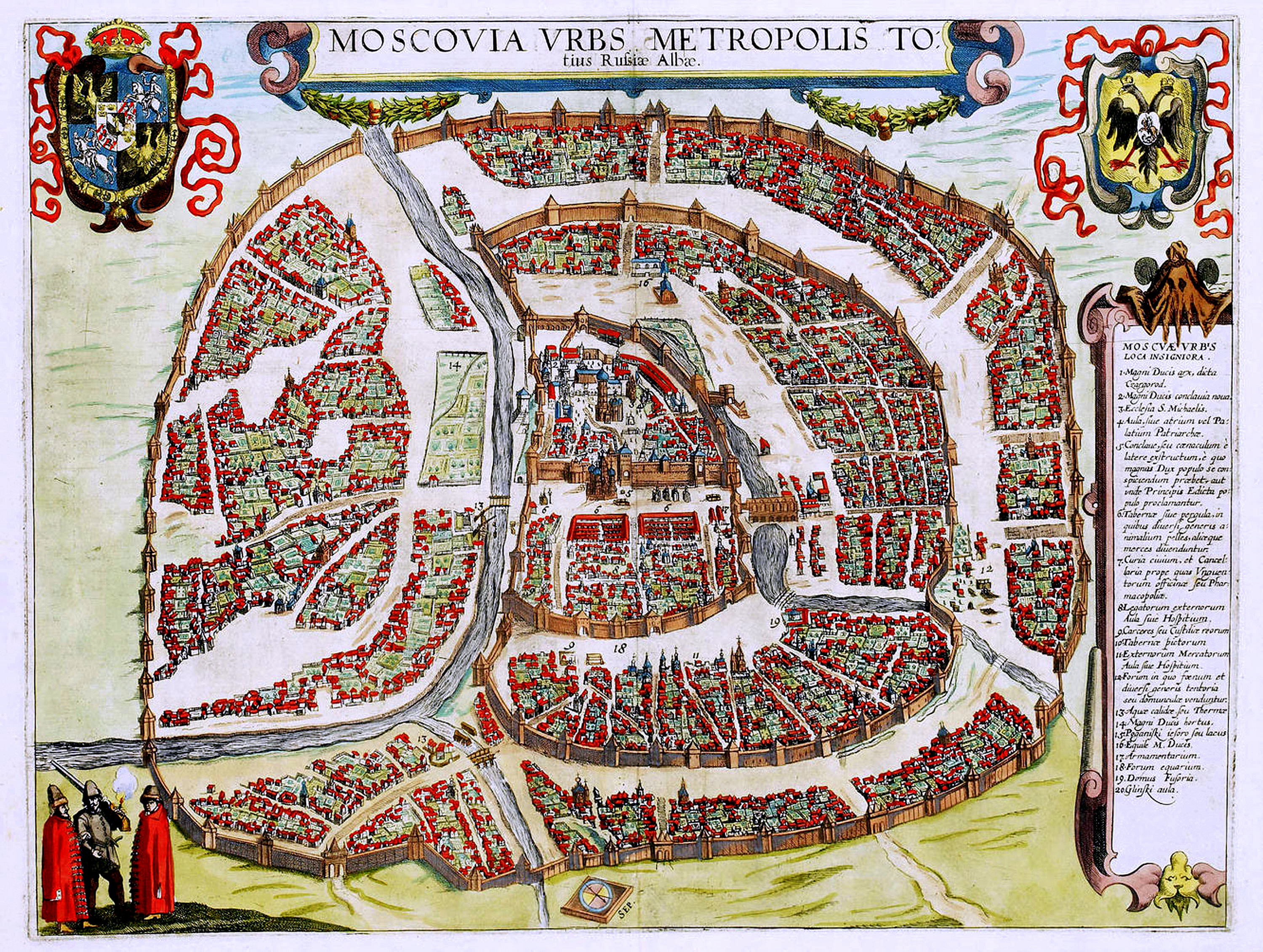 image: [top centre, in cartouche] MOSCOVIA VRBS METROPOLIS TO: / tius Russiae Albae ; [right, in cartouche] MOSCVAE VRBIS / LOCA INSIGNIORA. / 1. Magni Ducis arx, dica / Czargorod. / 2. Magni Ducis conclavia nova. / 3. Ecclesia S. Michaelis. / 4. Aula, sive atrium vel Pa: / latium Patriarchae. / 5. Conclave, seu coenaculum è / latere extructum, è quo / magnus Dux populo se con: / spiciendum proebet, aut / unde Principis Edicta po: / pulo proclamantur. / 6. Tabernae sive pergula, in / quibis diversi generis a: / nimalium pelles, aliaeque / merces diuenduntur. / 7. Curia ciuium, et Cancel: / laria prope quas Vnguen: / torum officince seu Phar: / macopolia. / 8. Legatorum externorum / Aula suie Hospitium. / 9. Carceres deu Custdice reorum / 10. Tabernae pictorum / 11. Externorum Mercatorum / Aula siue Hospitium. / 12. Forum in quo foenulm et / diuersi generis tontoria / seu domunculae, venduntur. / 13. Aquae caldidae seu Thermae / 14. Magni Ducis hortus. / 15. Poganiski iesoro seu Iacus / 16. Equile M. Ducis. / 17. Armamentarium. / 18. Forum equarium. / 19. Domus Fusoria. / 20. Glinski aula.